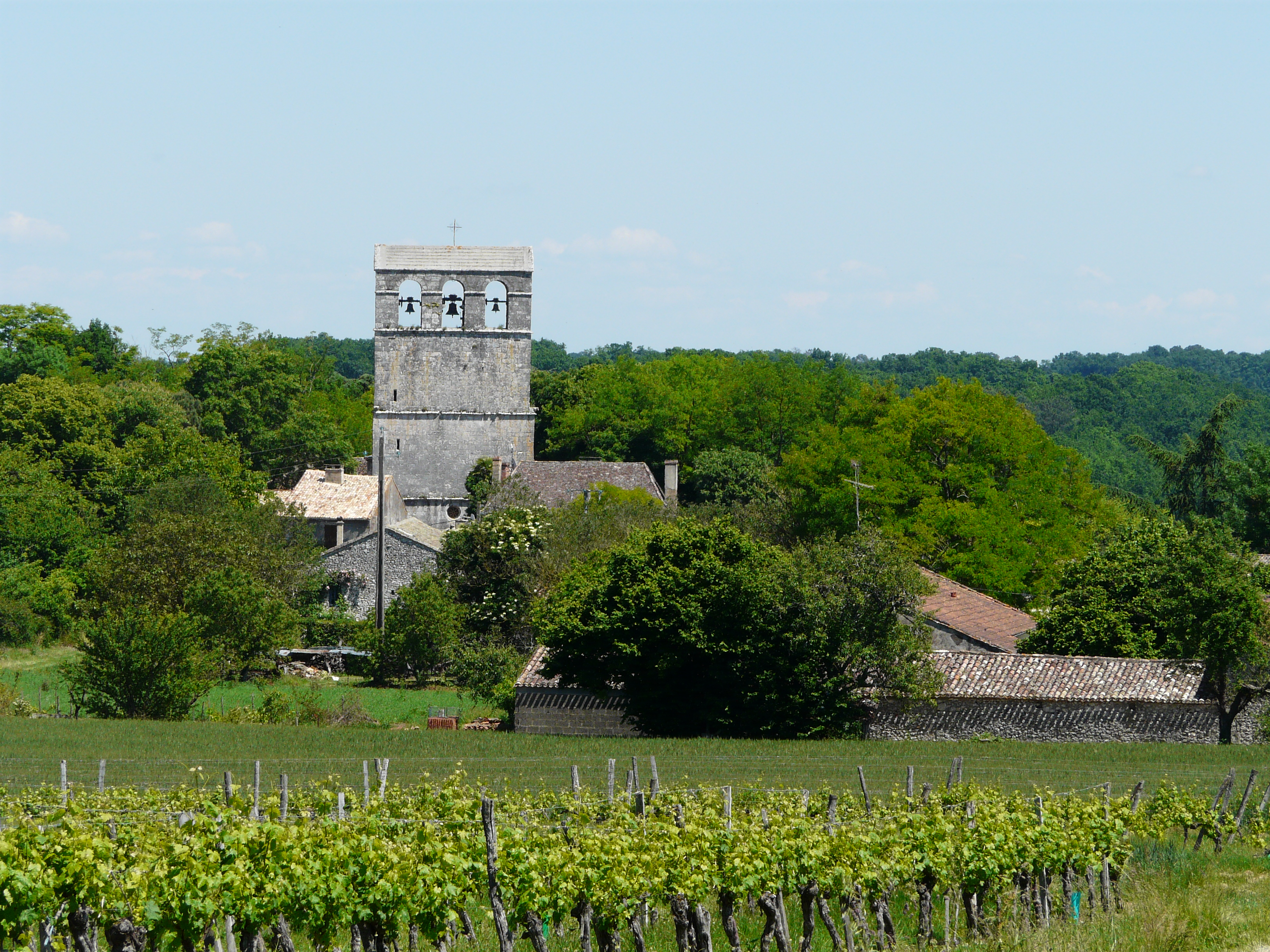 Le village de Conne-de-Labarde, Dordogne, France.